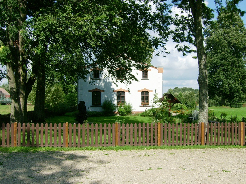 Bitėnai. M.Jankaus spaustuvė